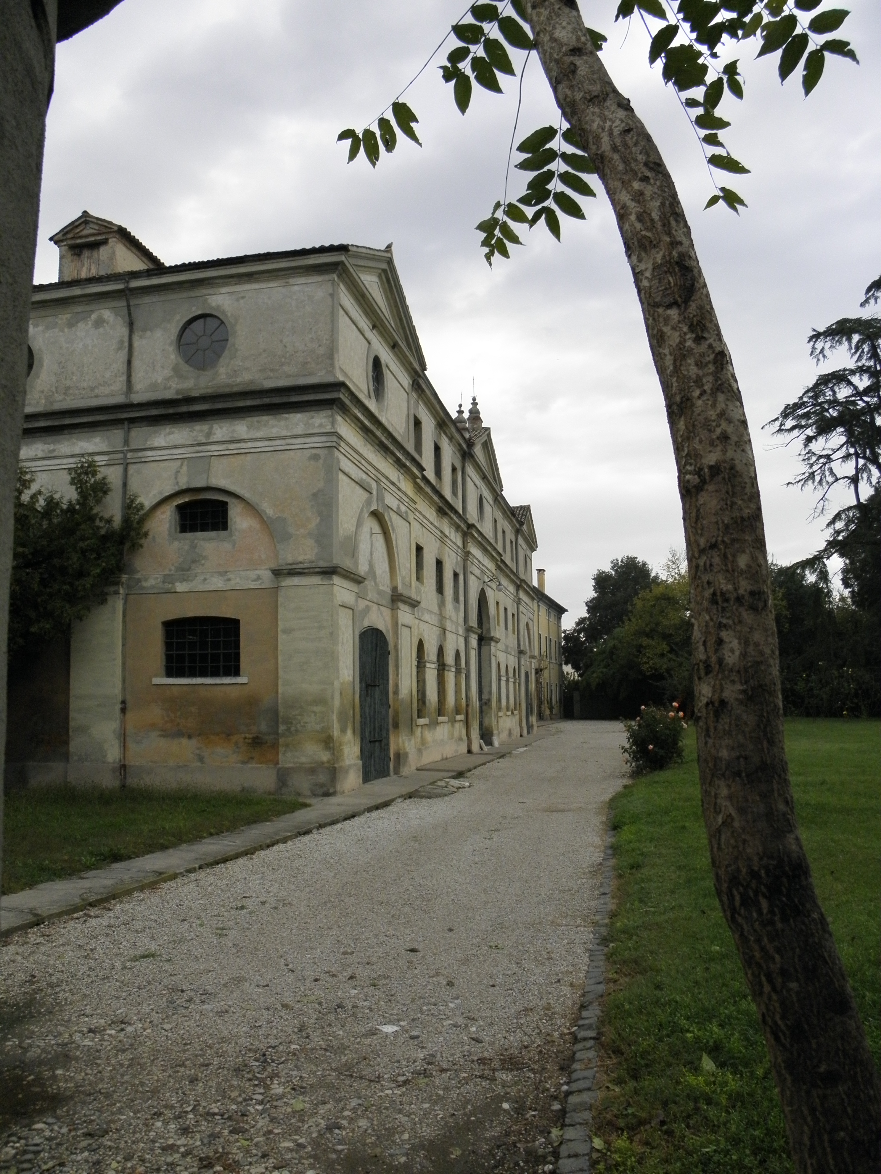 Villa Marzolla, Crespino: Vista lato anteriore dal cancello.